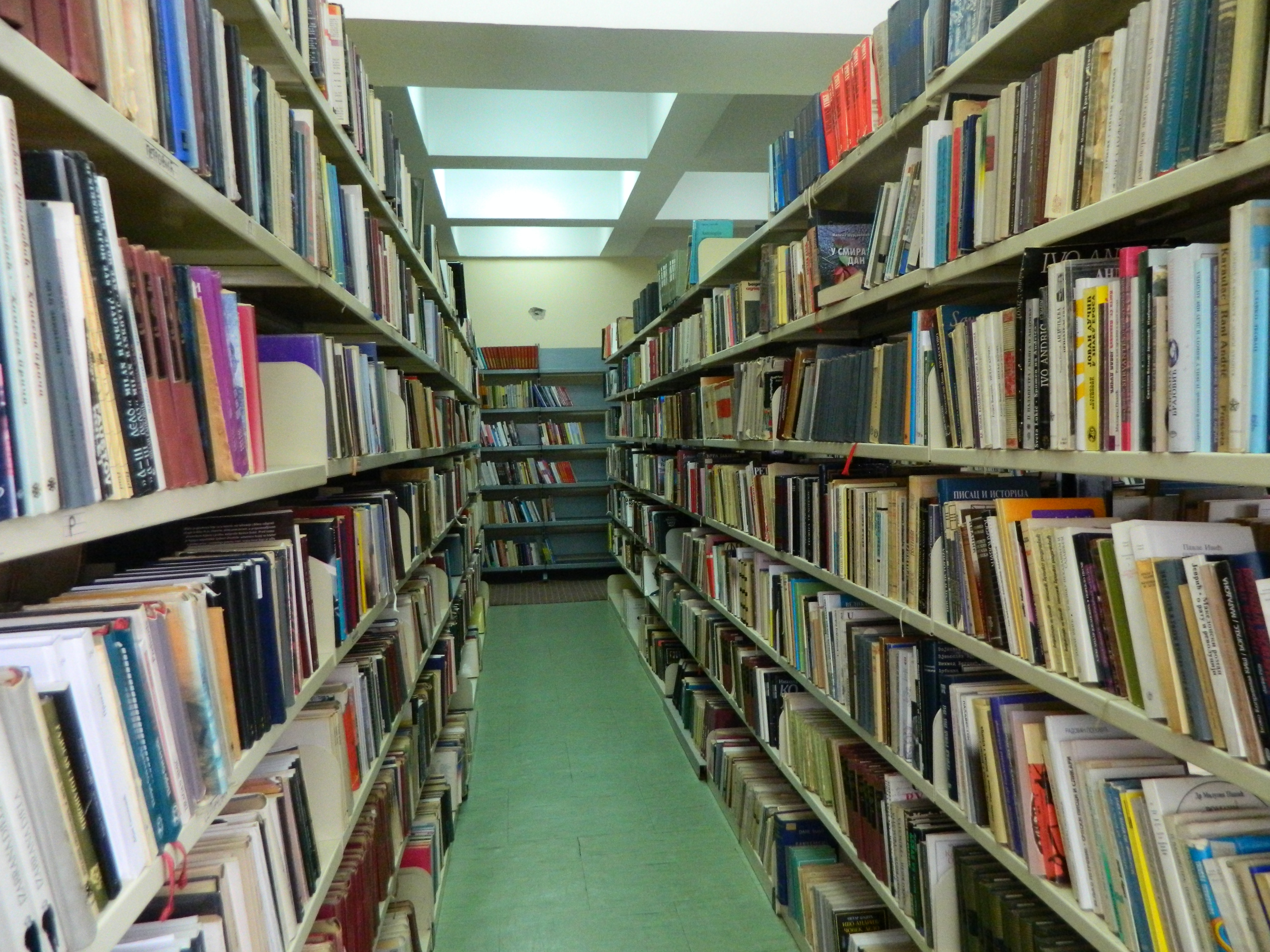 Biblioteka Varvarin, sredjene police